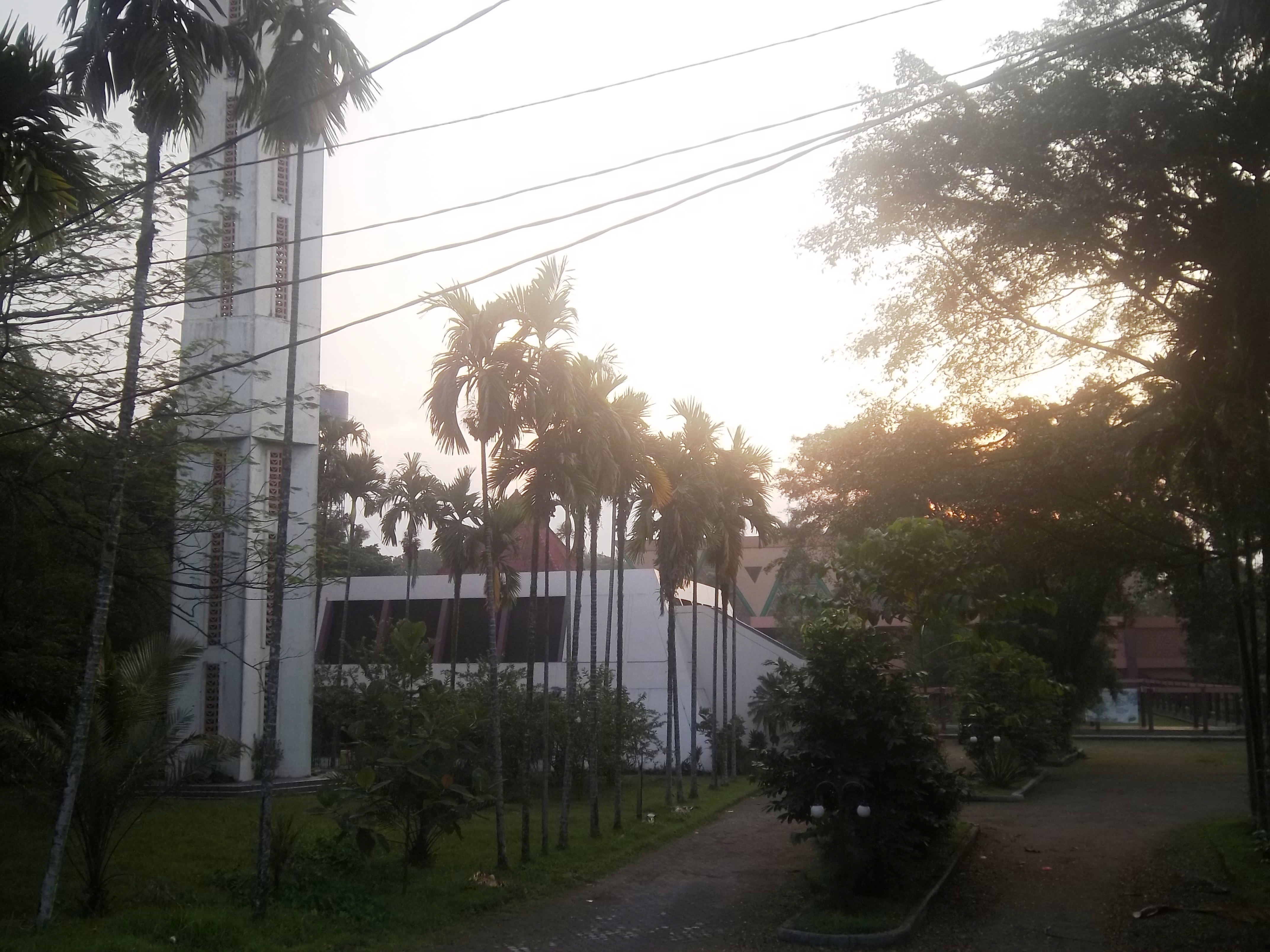 Masjid pertama Al Hurriyah (yang kini menjadi aula) dan menaranya, dengan latar belakang masjid kedua Al Hurriyah